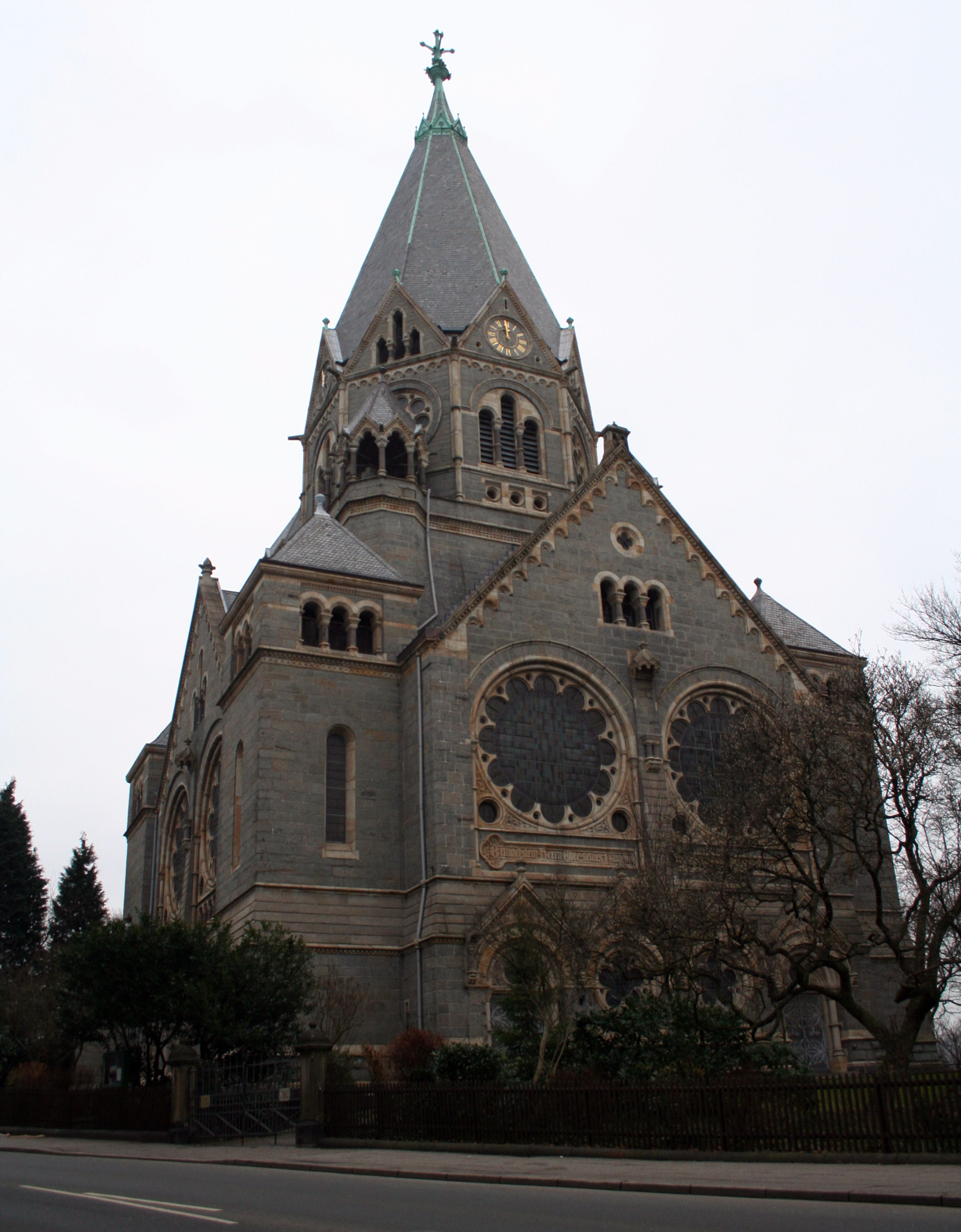 Beschreibung: Friedhofskirche in Wuppertal Quelle: Selbst erstellt Datum: 06.Januar 2006/ 23.Februar 2007 Autor: Thomas Kathöfer